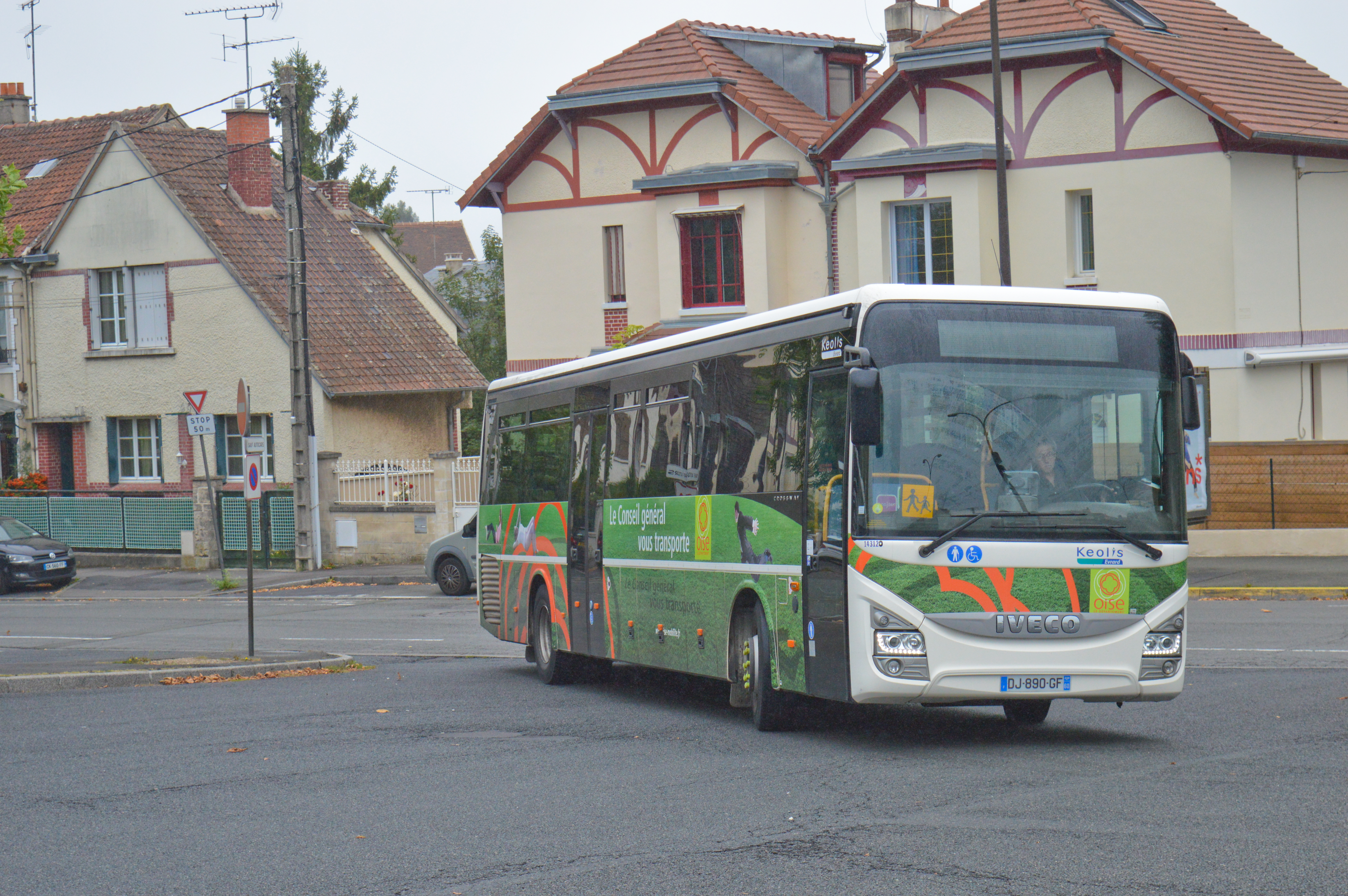 Autocar arrivant en gare routière de Chantilly